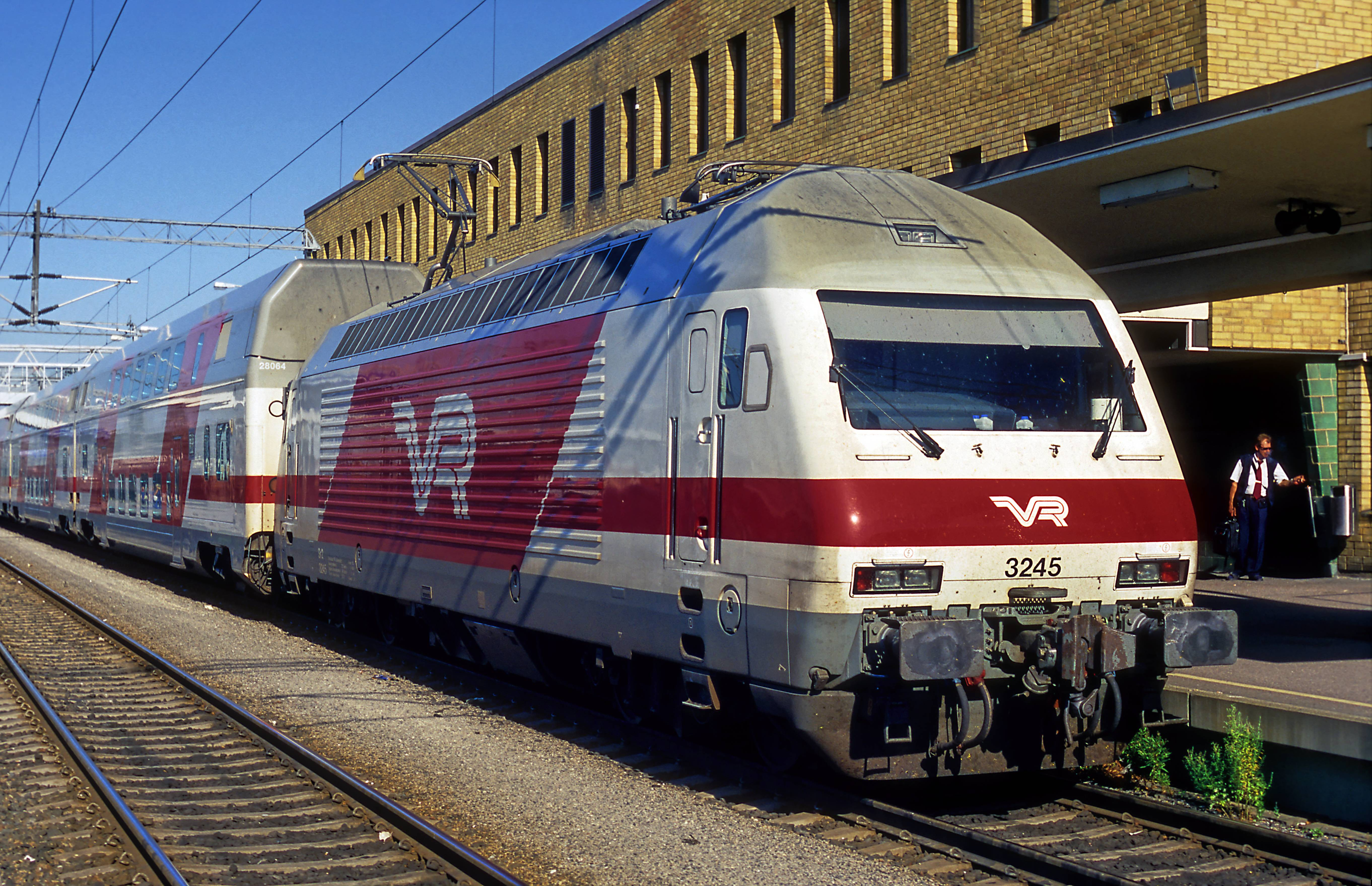 IC2-Doppelstockzug von Helsinki im weiß-roten Ursprungsanstrich nach der Ankunft in Turku. Die Lokomotive ist bereits mit Unilink-Kuppelköpfen ausgerüstet. Diese ermöglichen mit einer integrierten Kuppelkette das adapterlose Kuppeln mit Fahrzeugen mit Schraubenkupplung.